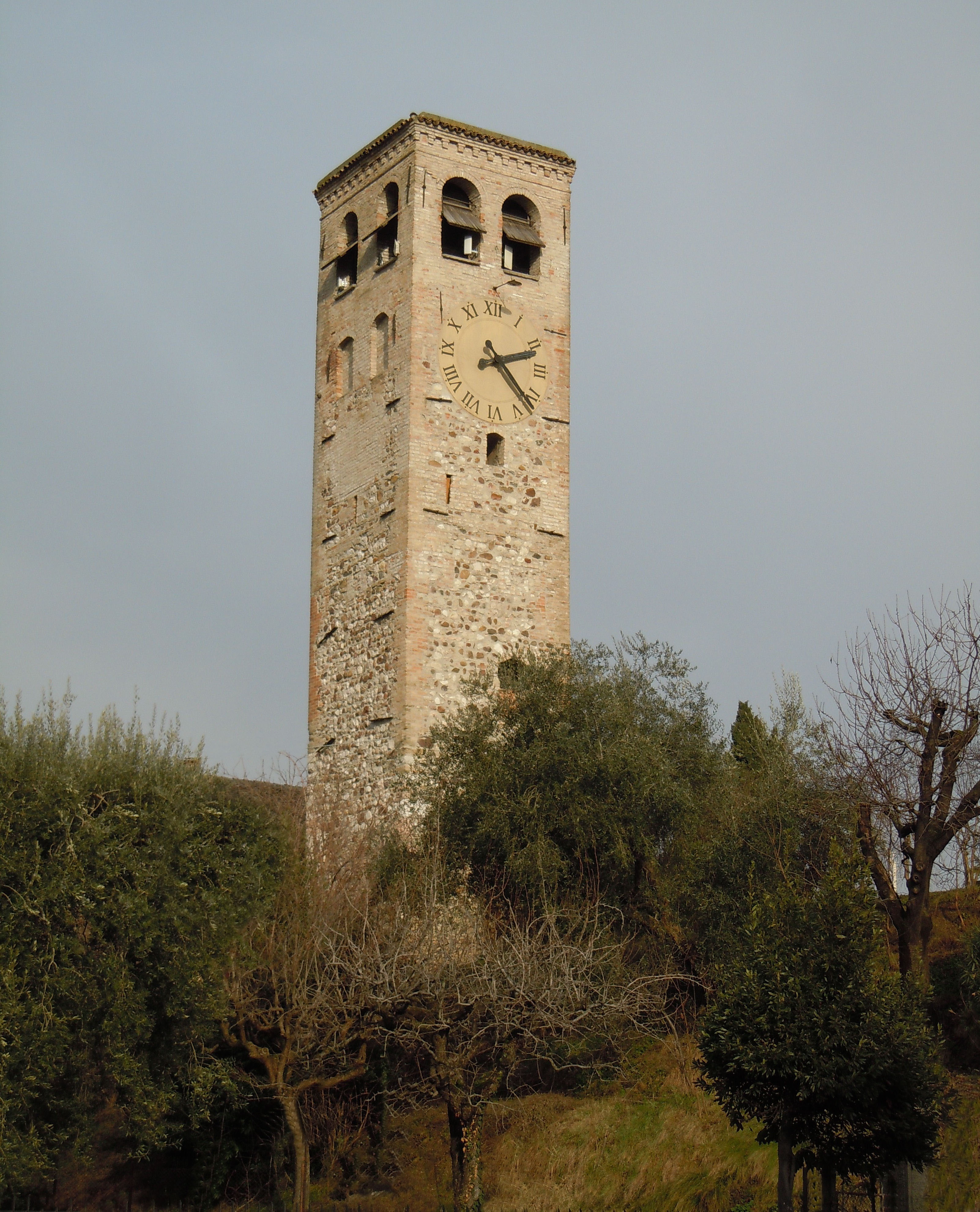 Rivoltella del Garda, il castello.